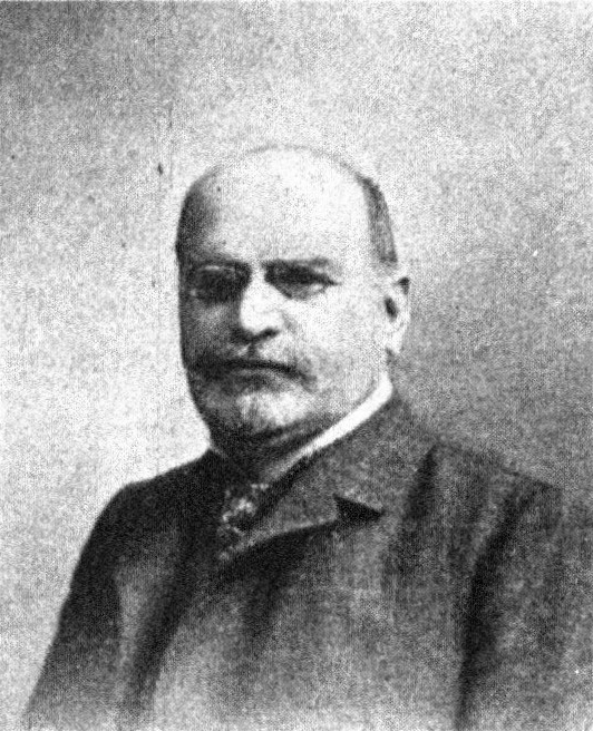 Österreichischer Politiker, Reichsratswahl 1907, Name siehe Dateiname